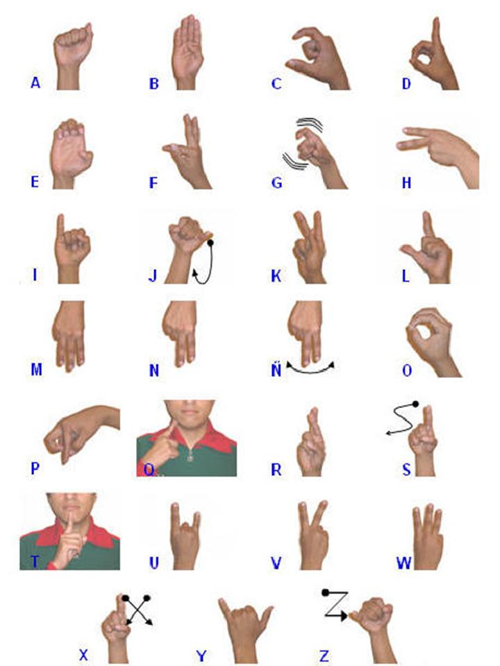 alfabeto manual de chile